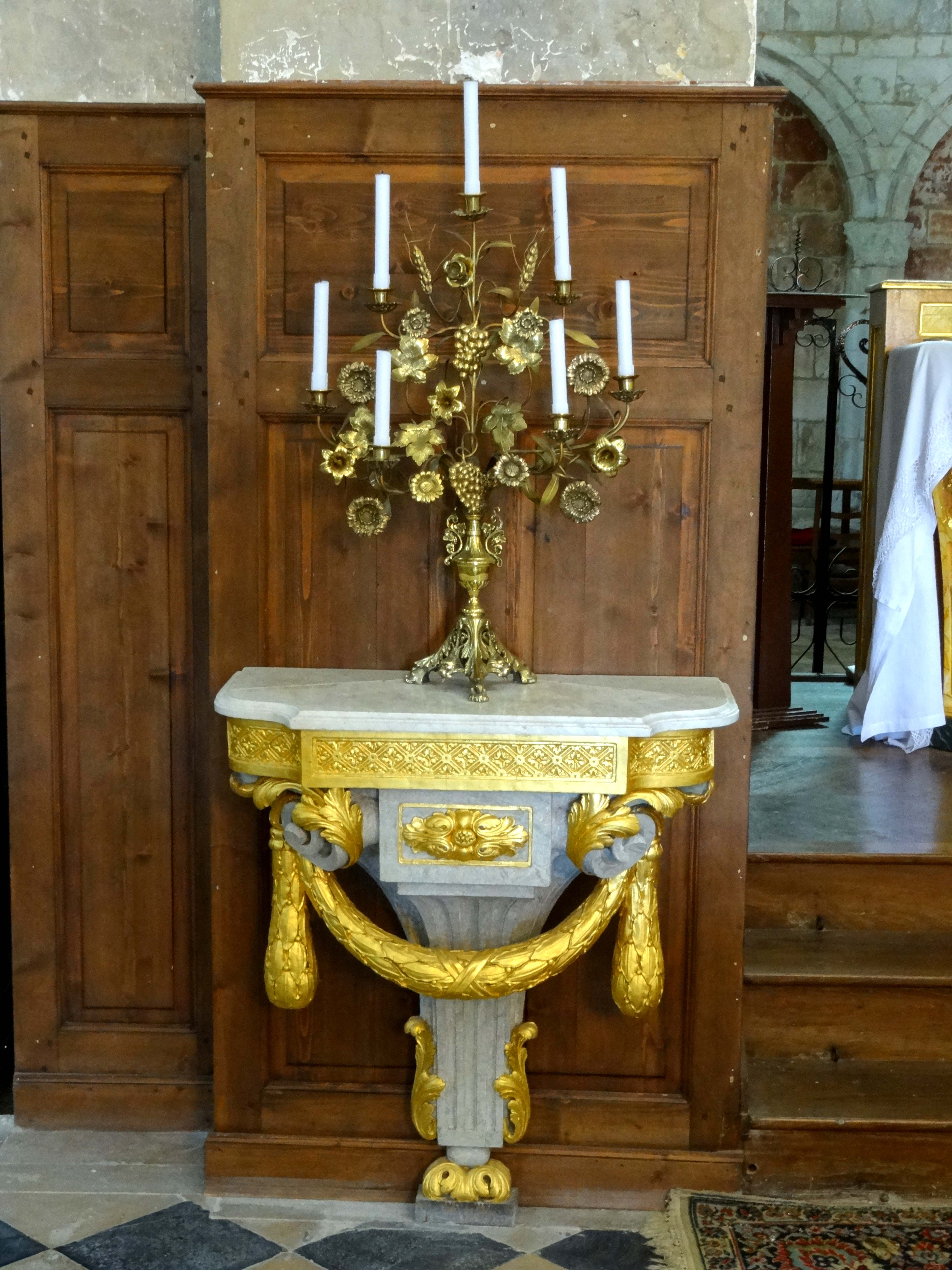 Ensemble de deux crédences, seconde moitié XVIIIe siècle.